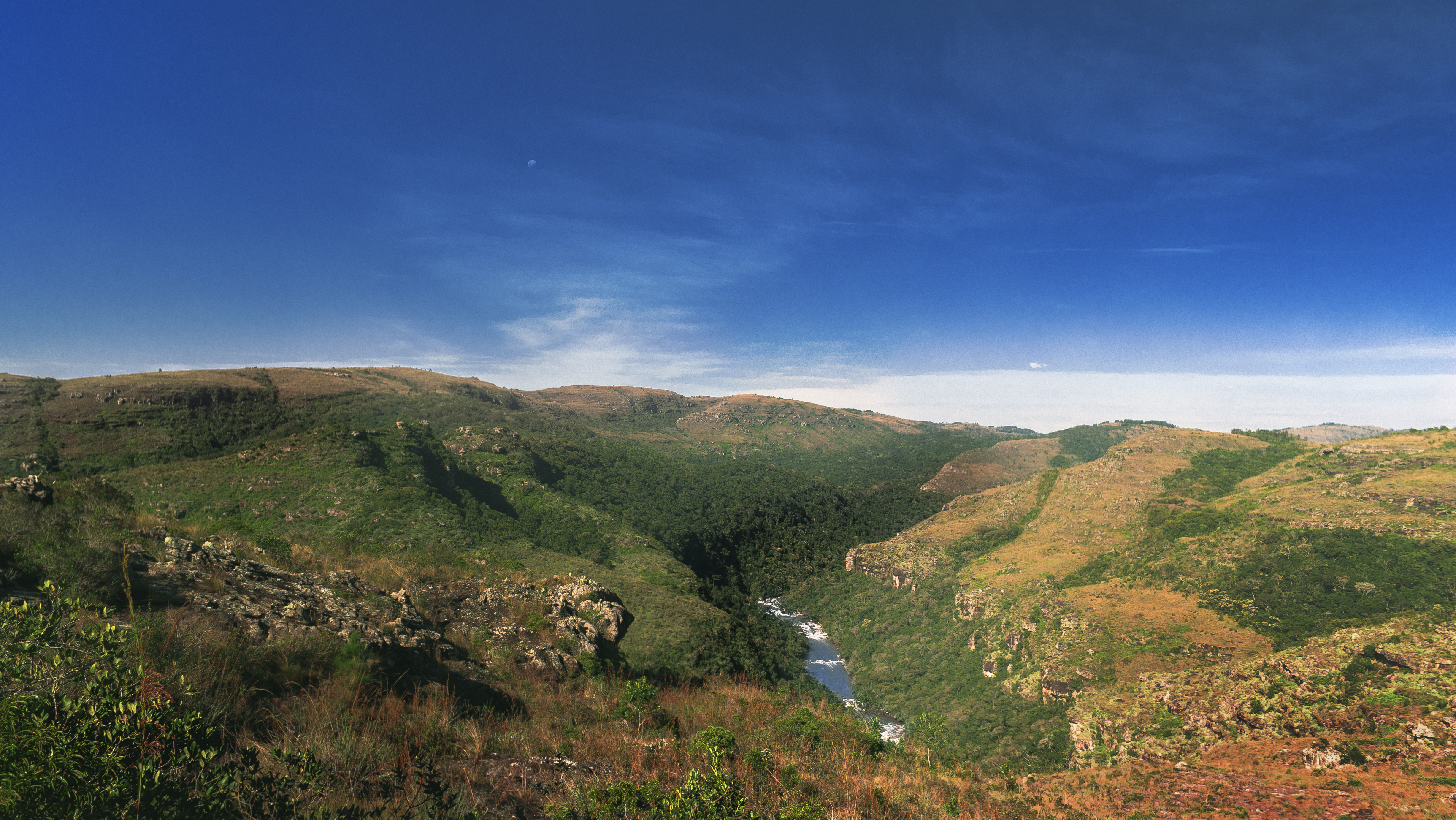 Foto da vista do Canyon Guartelá, pela trilha das pinturas rupestres.